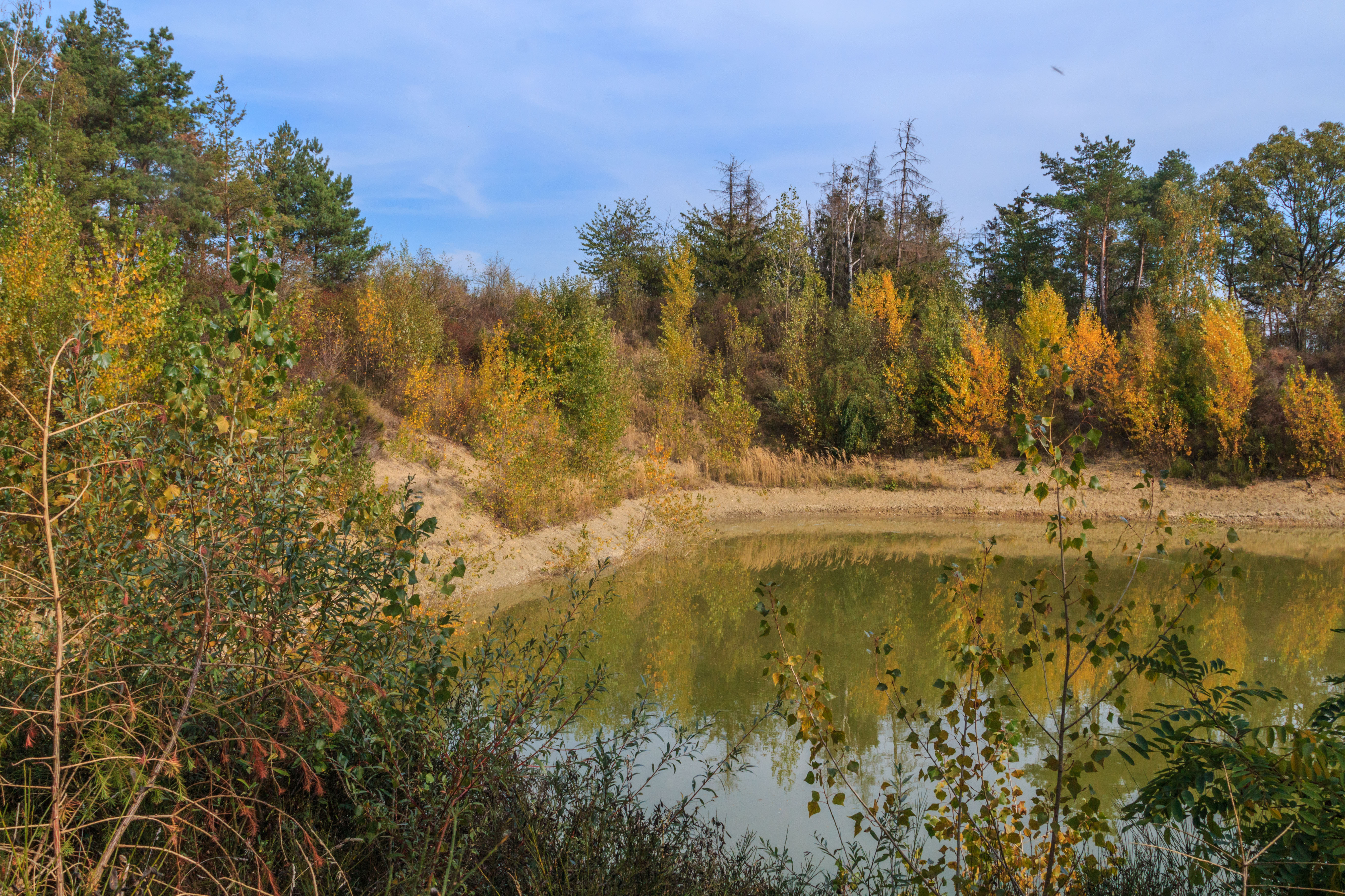 Písník Na horkách Project: Vodstvo.